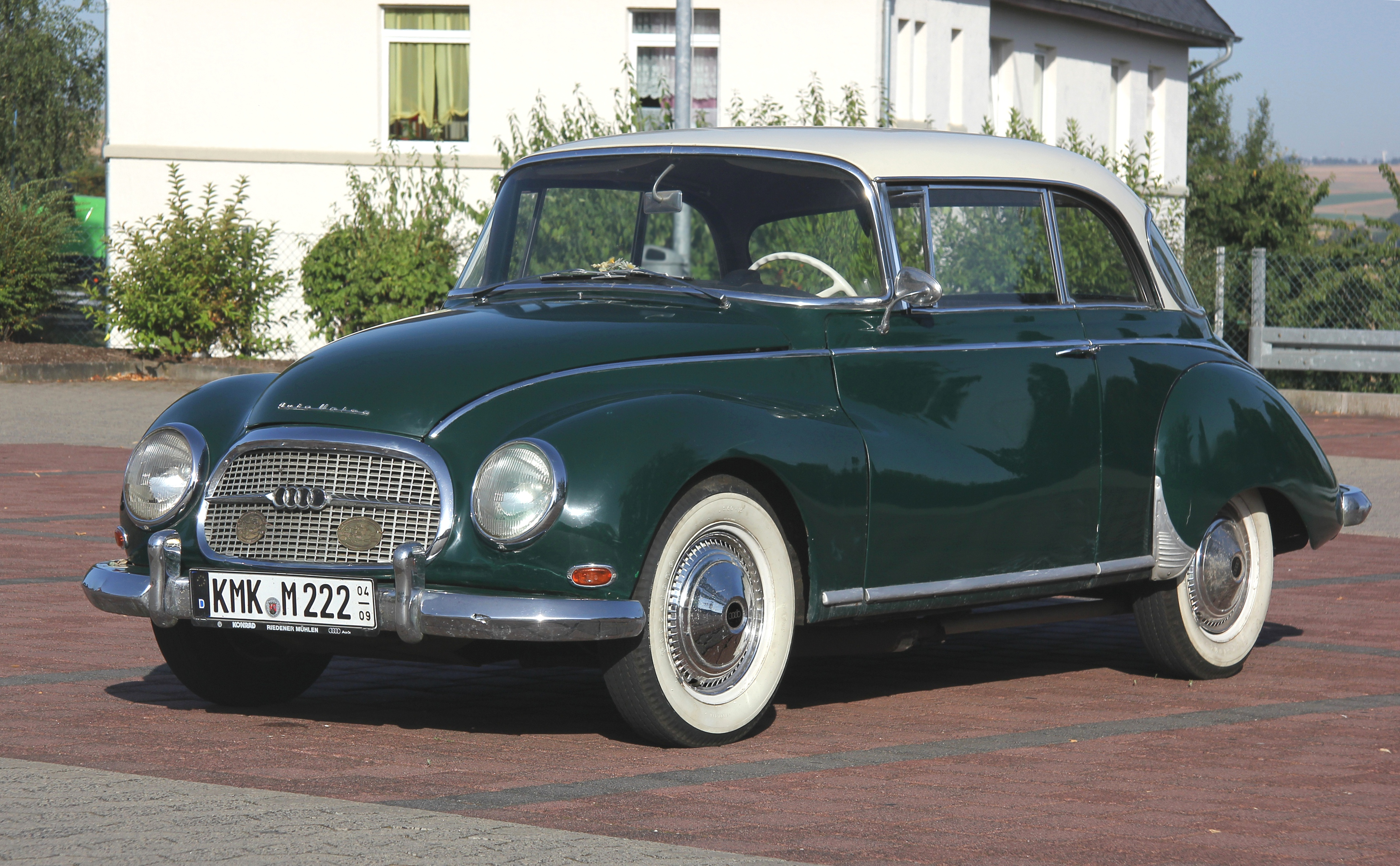 Auto Union 1000 S (Fantasiekennzeichen)